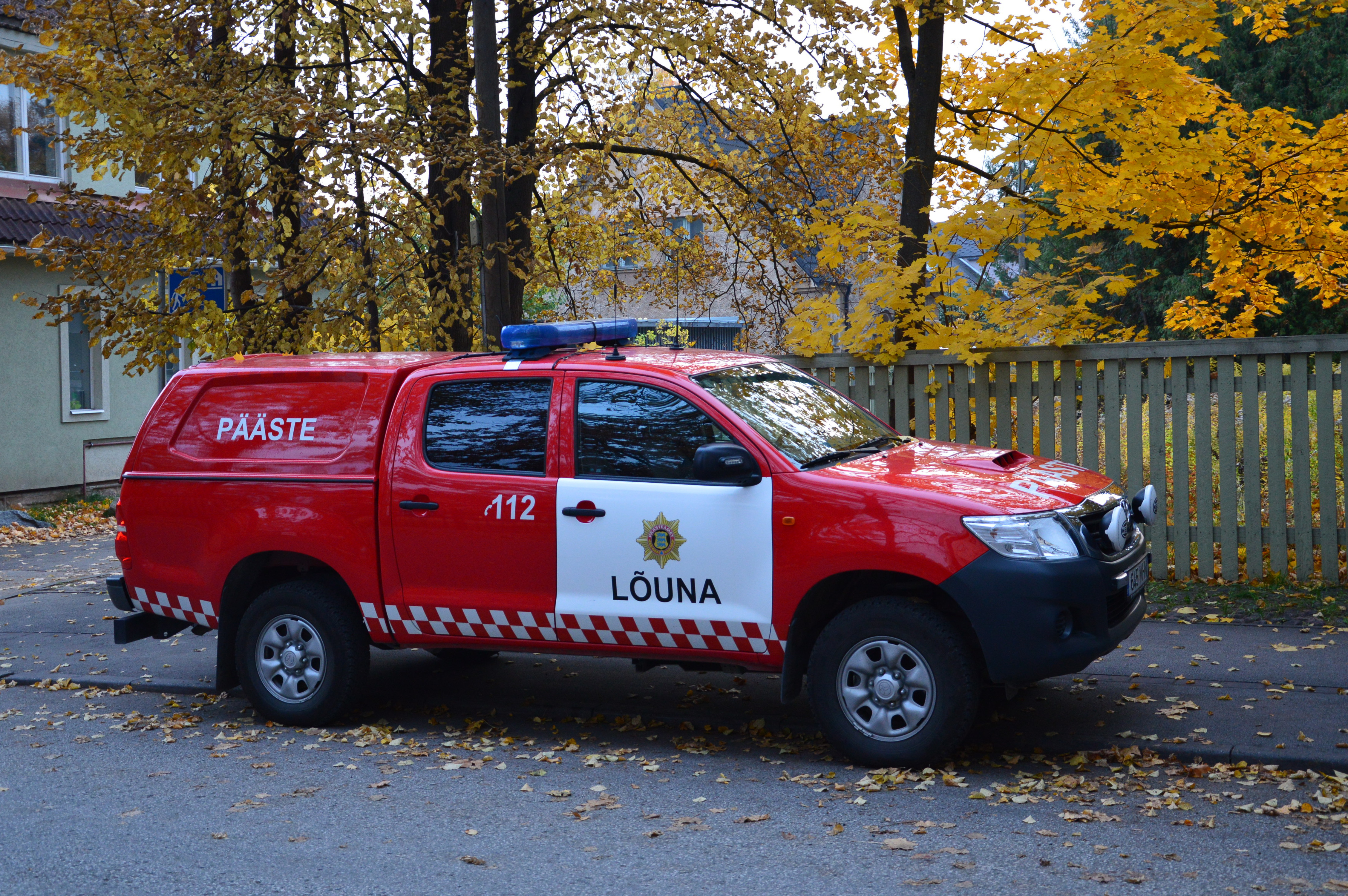 Lõuna-Eesti Päästekeskuse auto Tartus.